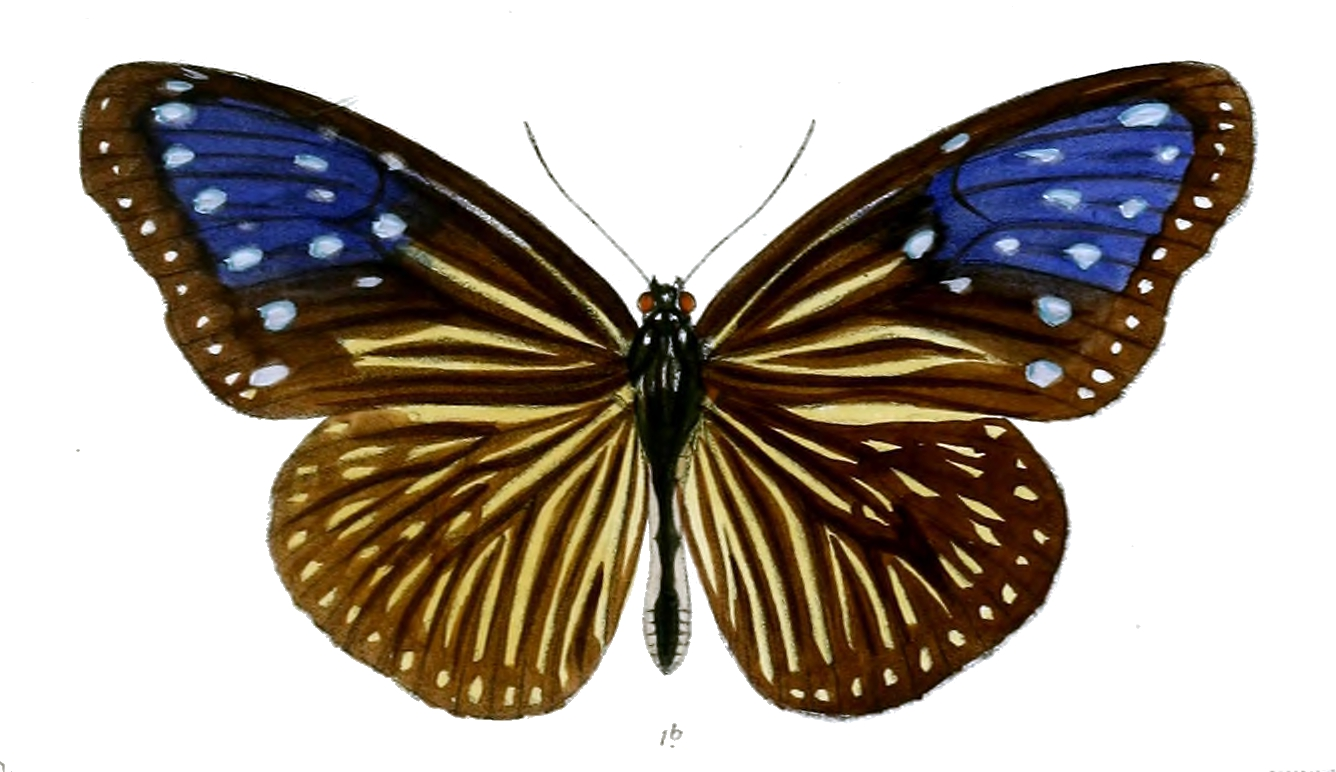 Trepsichrois linnaei = Euploea mulciber